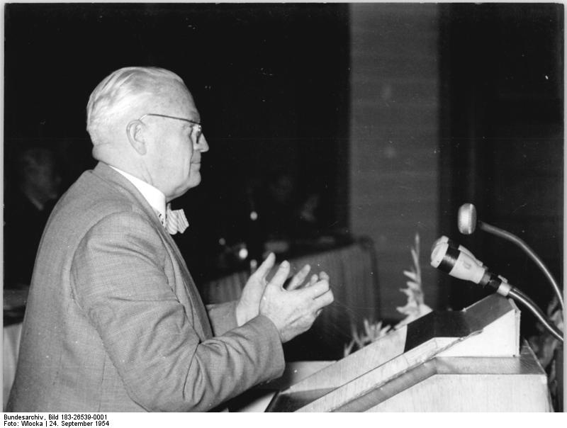 Zentralbild-TBD-Wlocka 2465 Zi-Ho. 6 Motive 24.9.1954 7. Parteitag der CDU in Weimar - 21. bis 25.9.1954 Der 2. Verhandlungstag des CDU-Parteitages am Donnerstag, den 23.9.1954 stand im Zeichen der Aussprachen. UBz: Probst Grüber bei seinen Ausführungen.